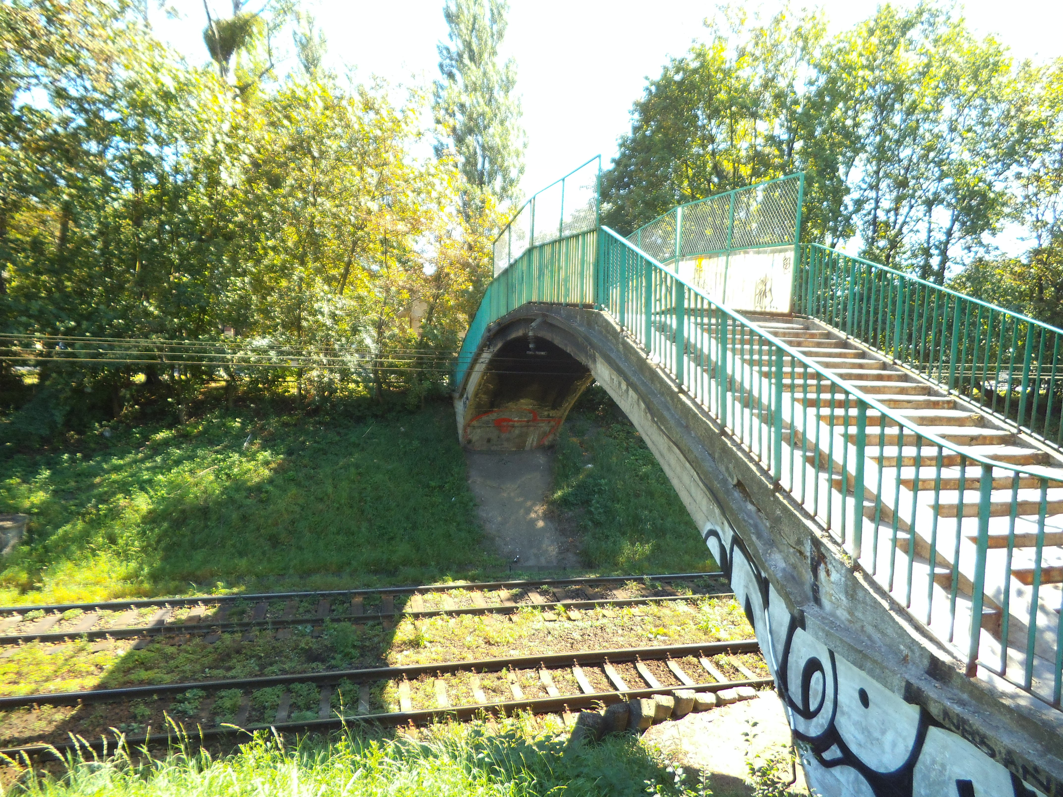 Garbaty Mostek w Toruniu888